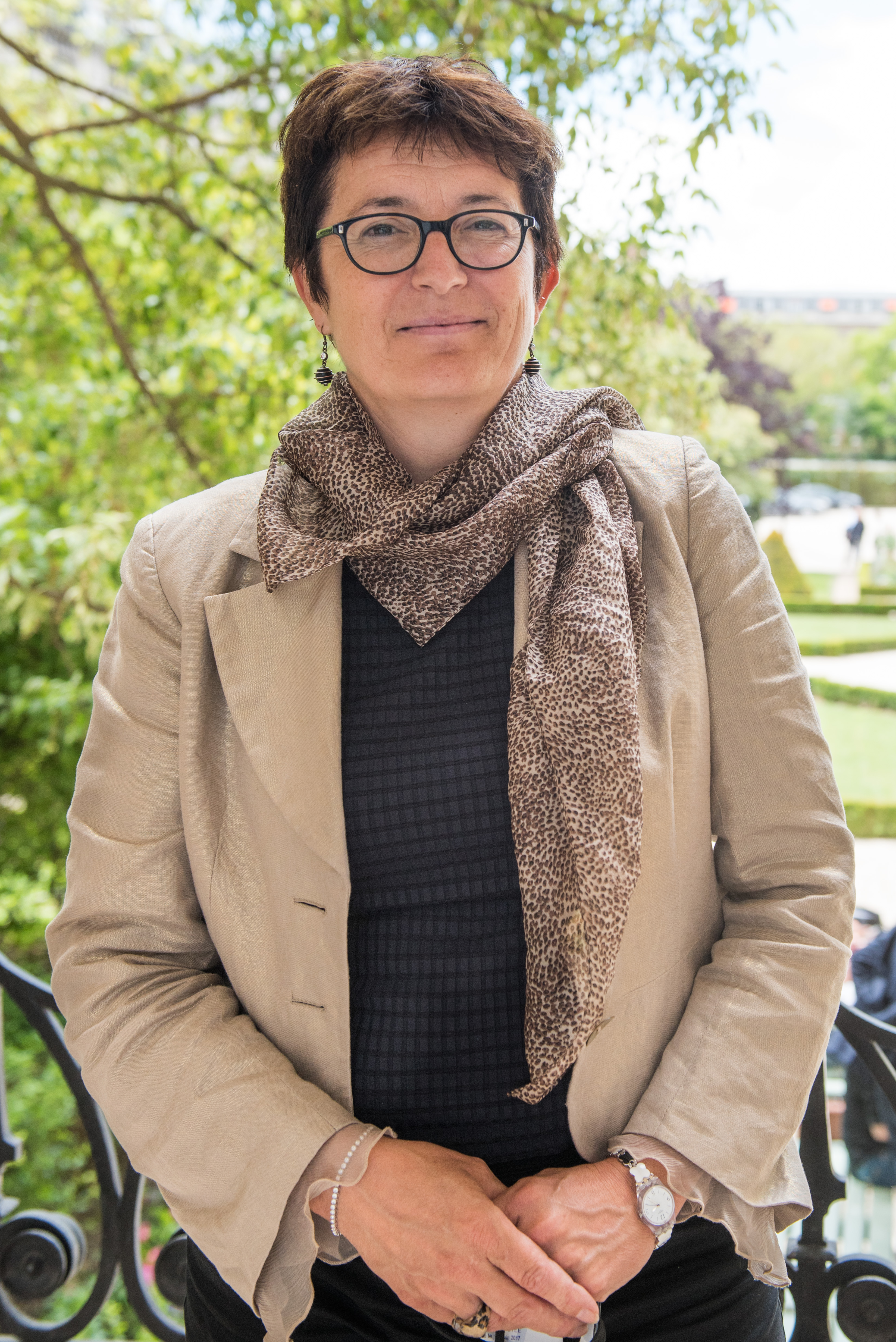 Sylvie Charrière dans le jardin des Quatre colonnes du palais Bourbon en 2017.